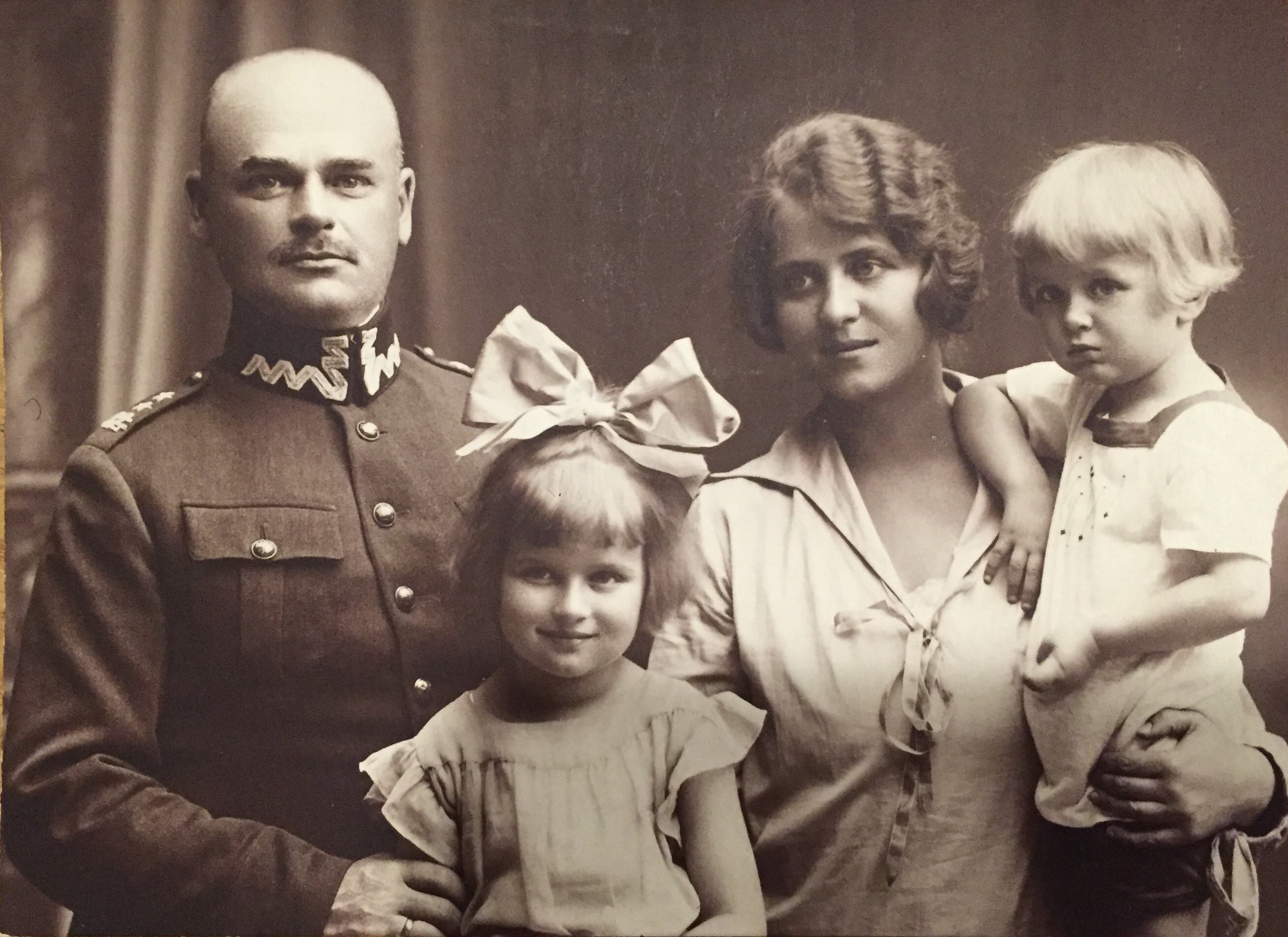 Mieczysław Sokół Szahin w wieku 38 lat z żoną i dziećmi: 6 letnią Janiną i rocznym Stanisławem. 1927 rok